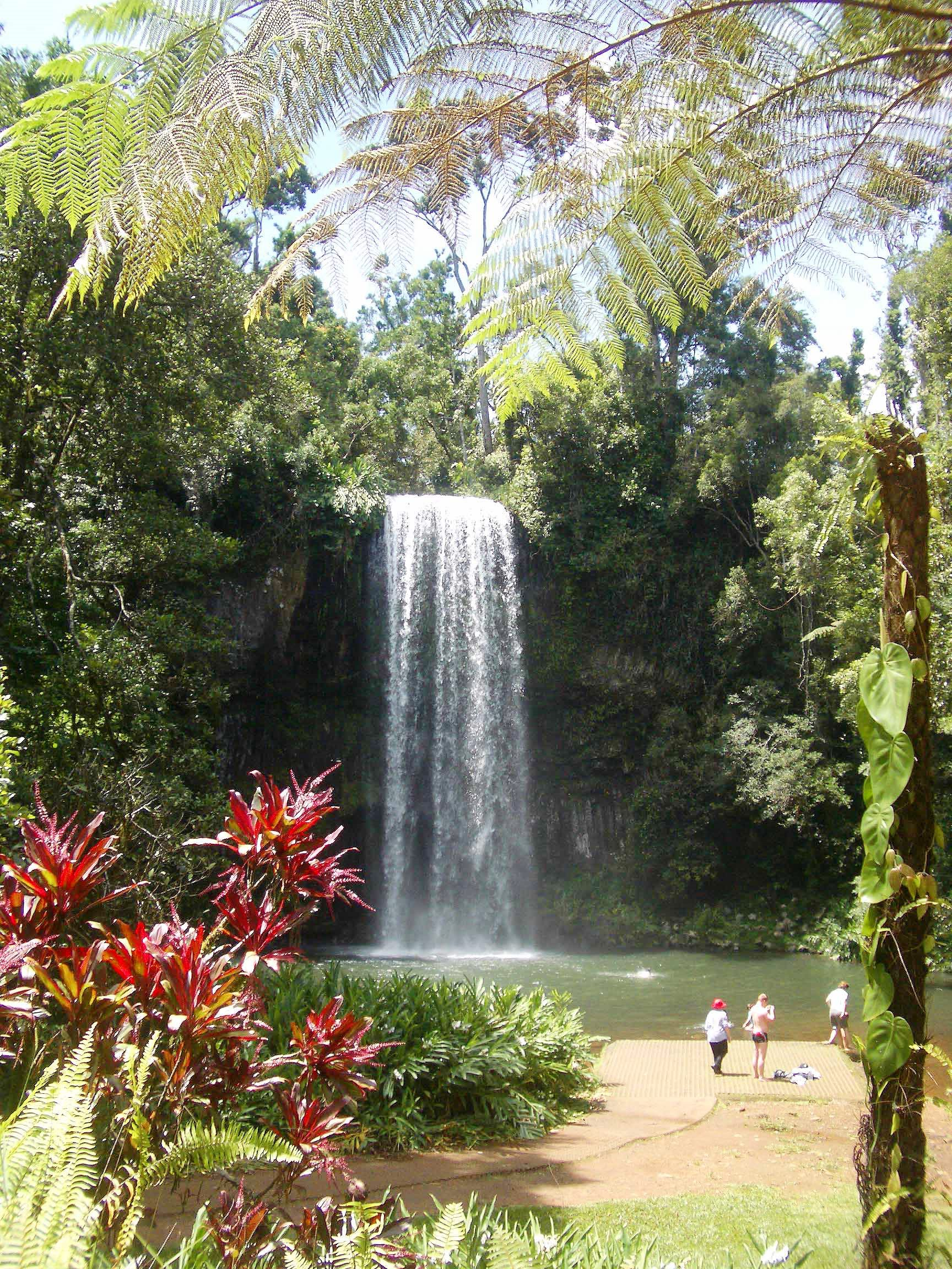 Millaa Millaa Falls, laŭdire la plej bela akvofola en Aŭstralio.